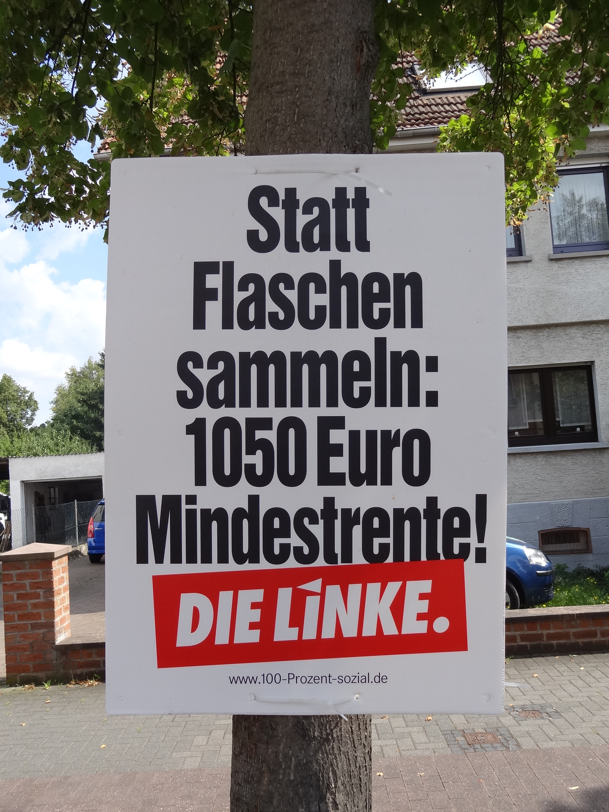 Wahlplakat 2013 (nur Text) der Linkspartei in Gießen.